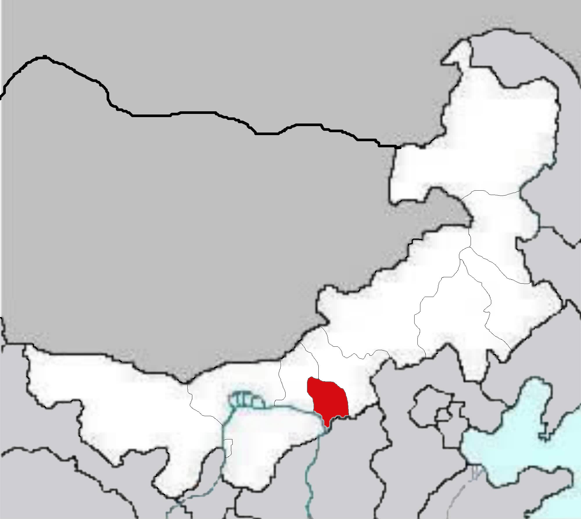 Inner Mogolia Maps